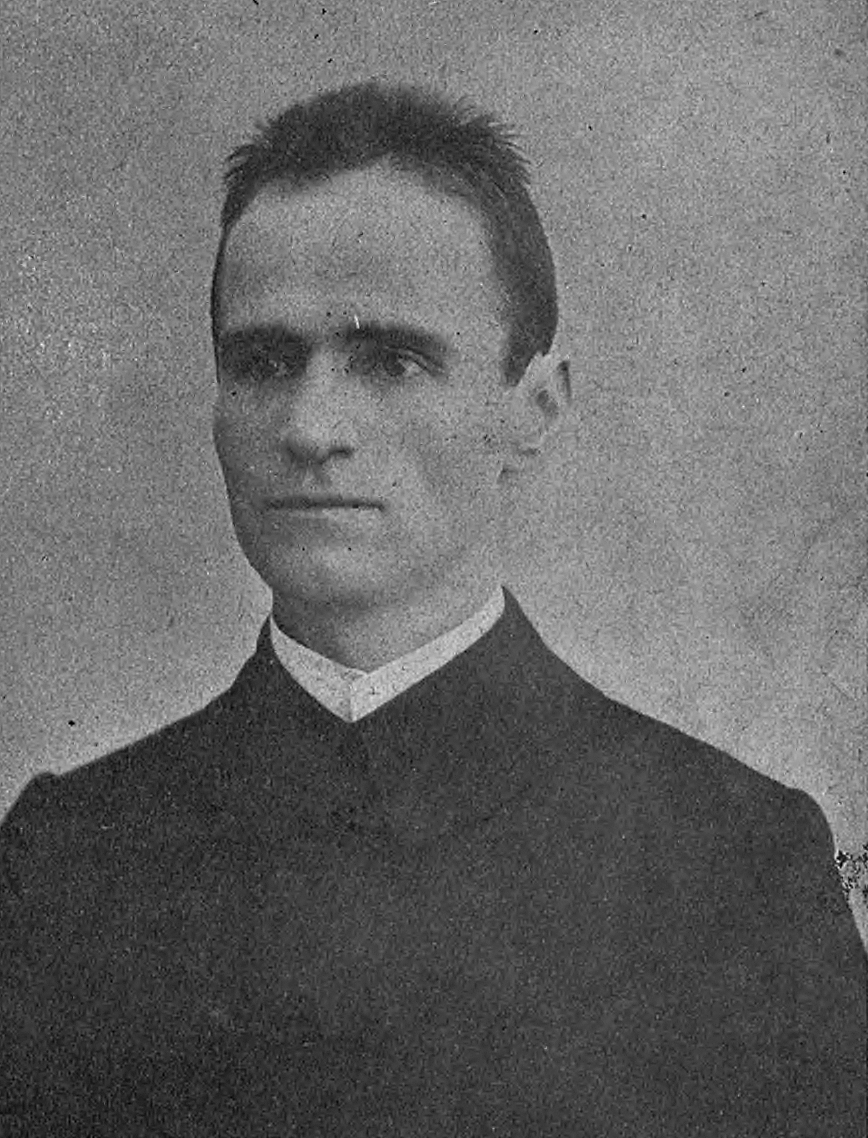 Andrzej Szponder (-1907)